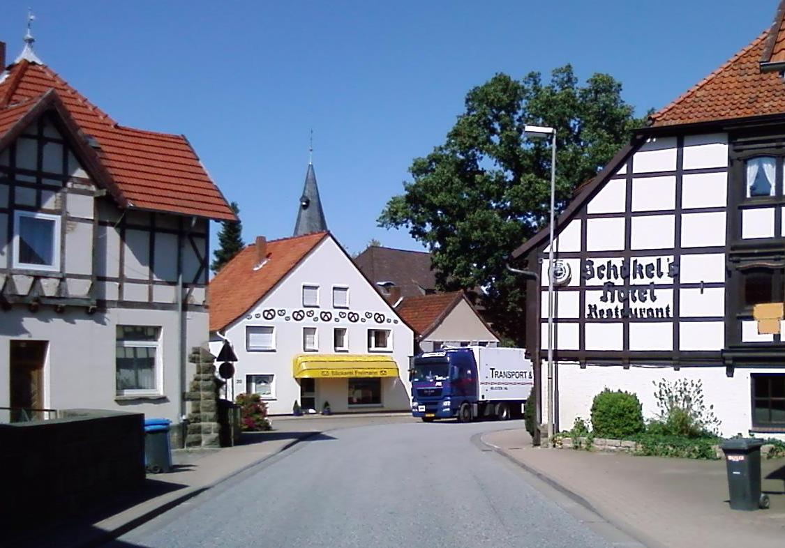 Elze, Ortsteil Mehle, Dorfmitte